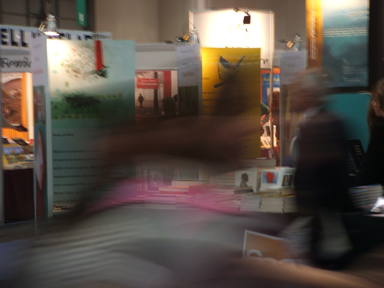 Torino Fiera internazionale del libro 2006